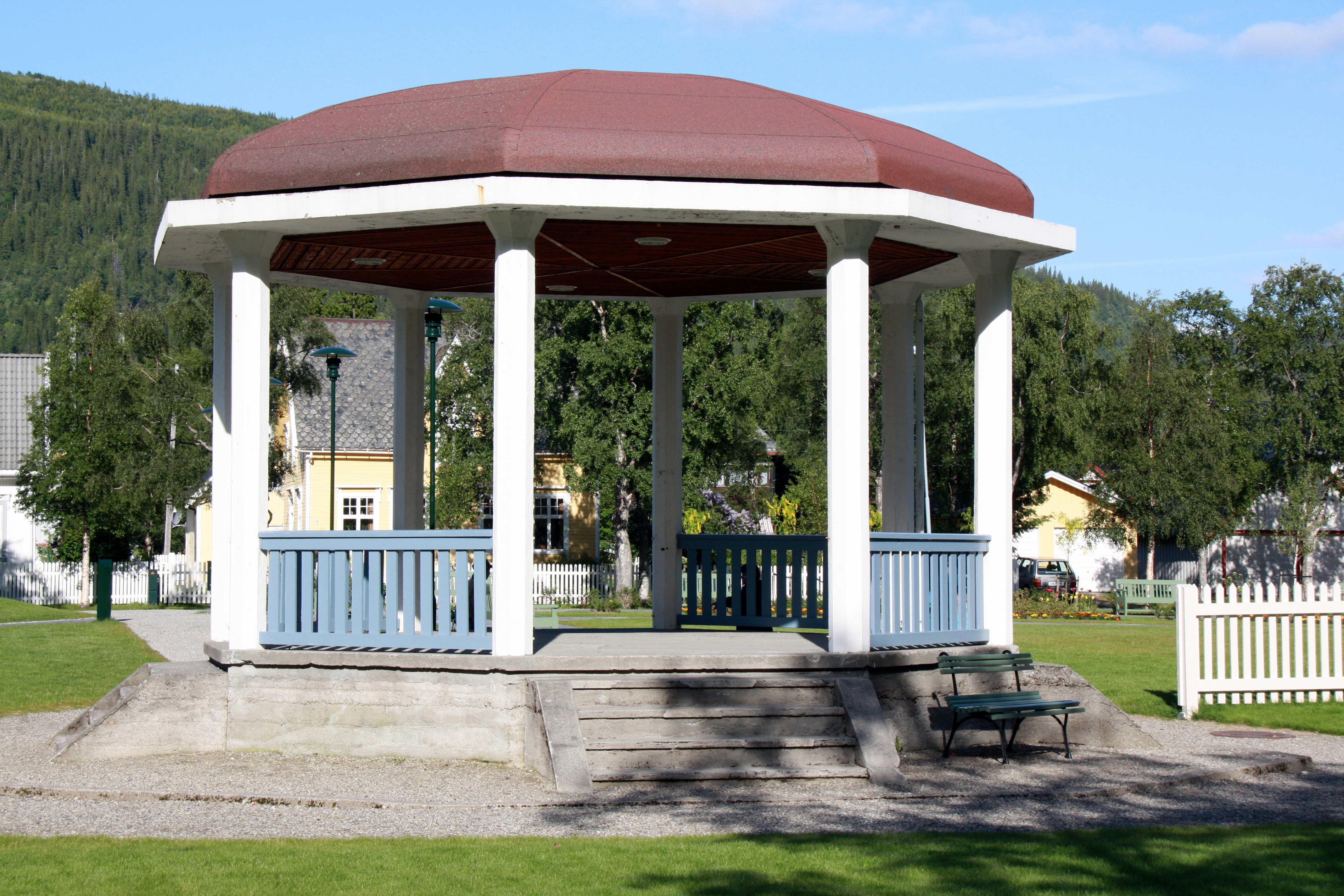 Paviljong i Byparken i Mosjøen.